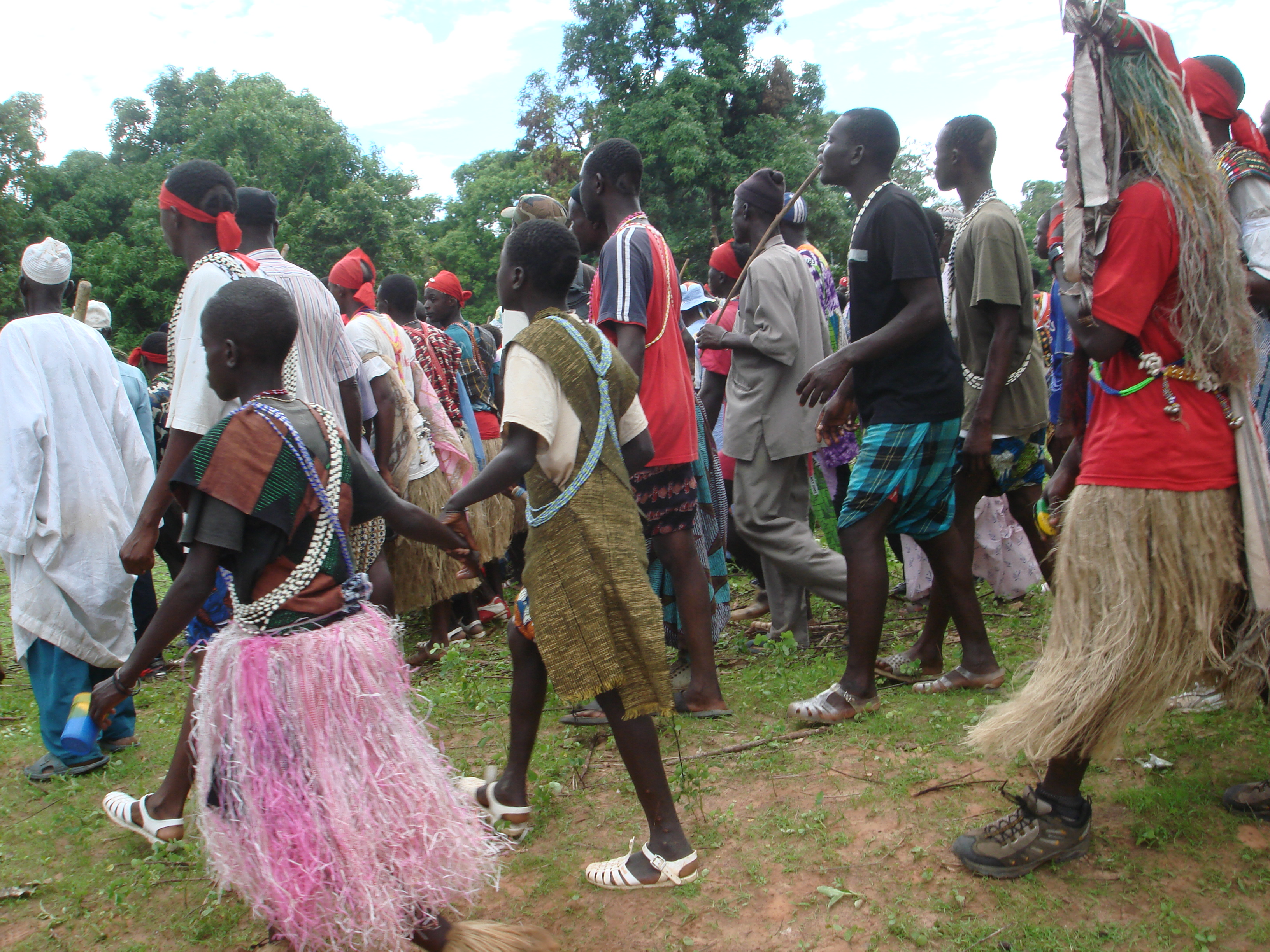 En route pour le boukout (rite d'initiation) de Baïla (Casamance, Sénégal)